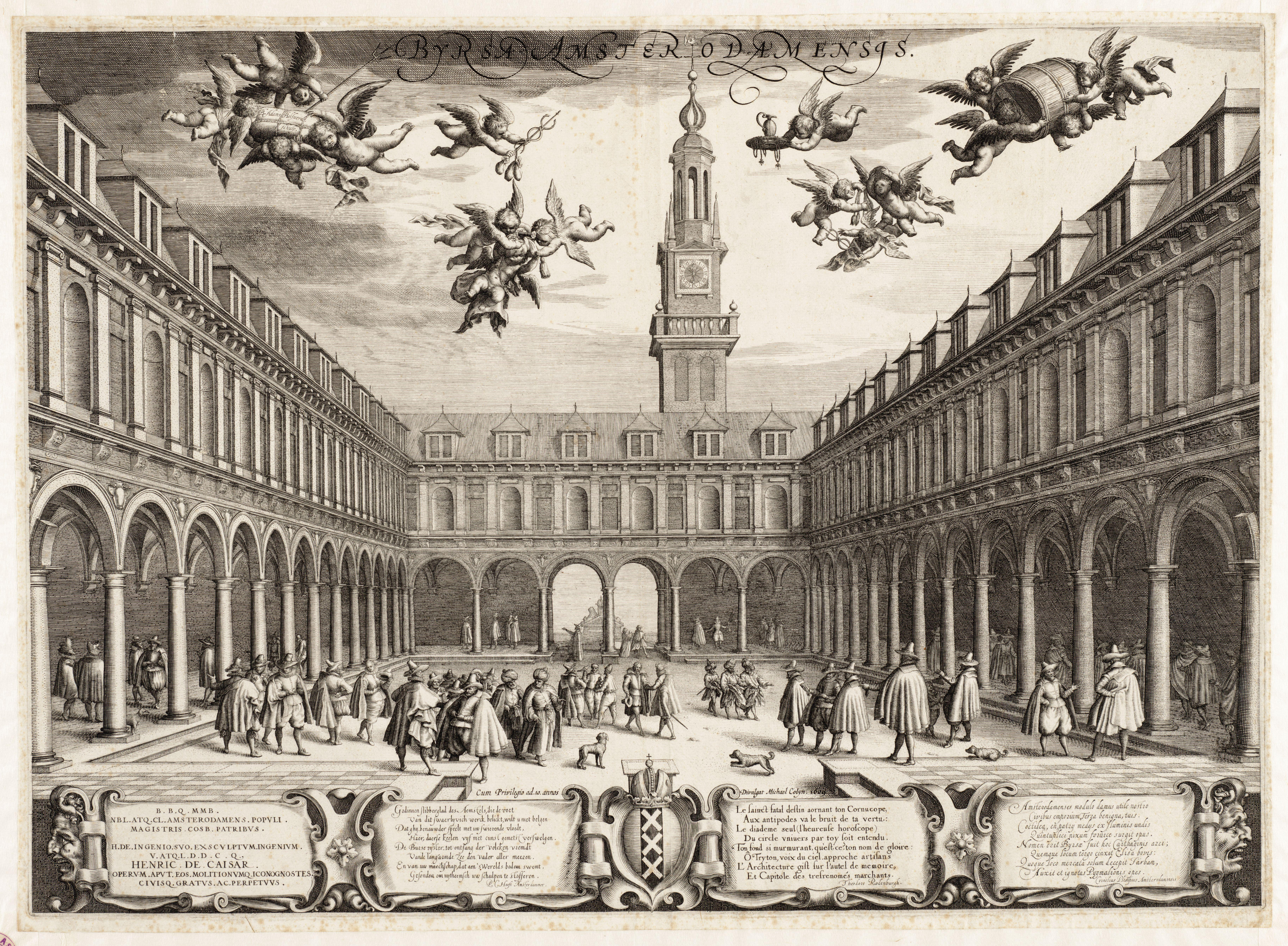 Beschrijving Byrsa Amsterodamensis De binnenplaats van de Beurs van Hendrick de Keyser, gezien naar de toren. Onder de voorstelling verzen van P.C. Hooft, Theodore Rodenburgh en Cornelis Plemp. Ets en gravure. Documenttype prent Vervaardiger Bolswert, Boetius Adamsz. Colijn, Michiel (uitgever van 1608-1635) Collectie Collectie Atlas Splitgerber Datering 1609 Geografische naam Rokin Inventarissen Afbeeldingsbestand 010001000896